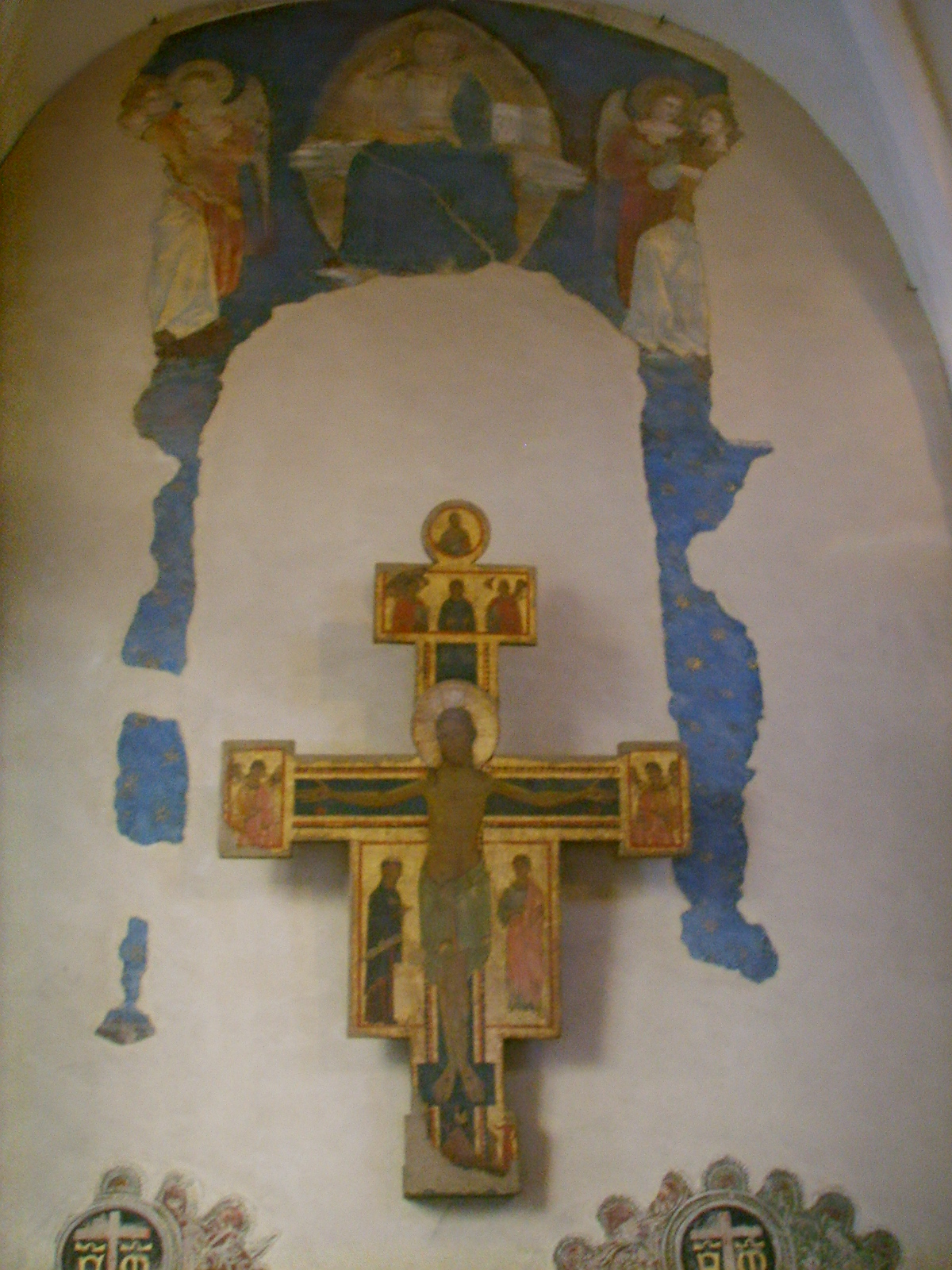 Museo_del_Bigallo,_ Crocifisso,_Maestro_del_Bigallo_e_resti_di_affreschi_con_cristo_fra_angeli_(bottega_di_Nardo_di_Cione)